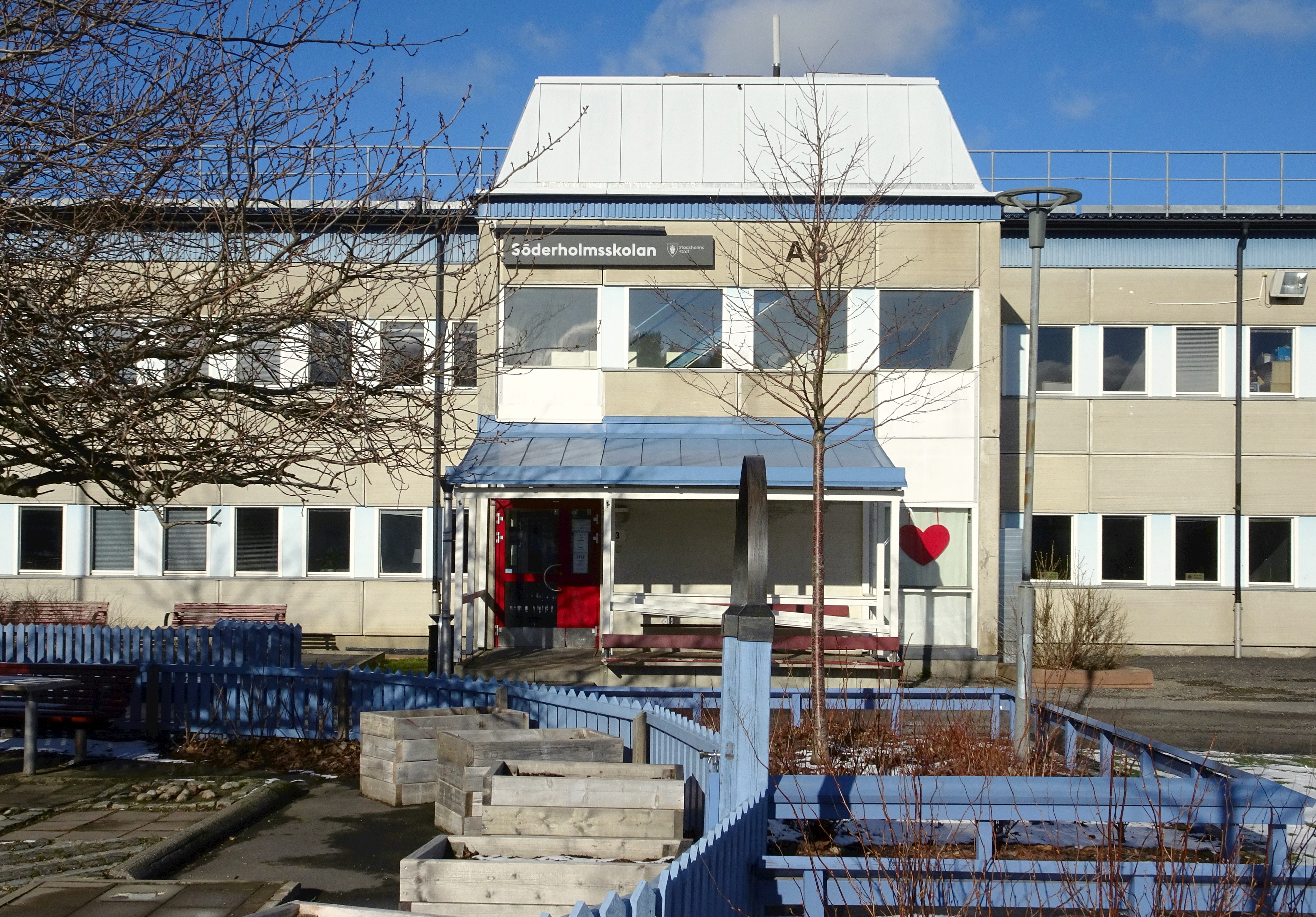 Söderholmsskolan, Vårberg, Våruddsringen 202, arkitekt Bengt Hidemark & Gösta Danielsson (1971)